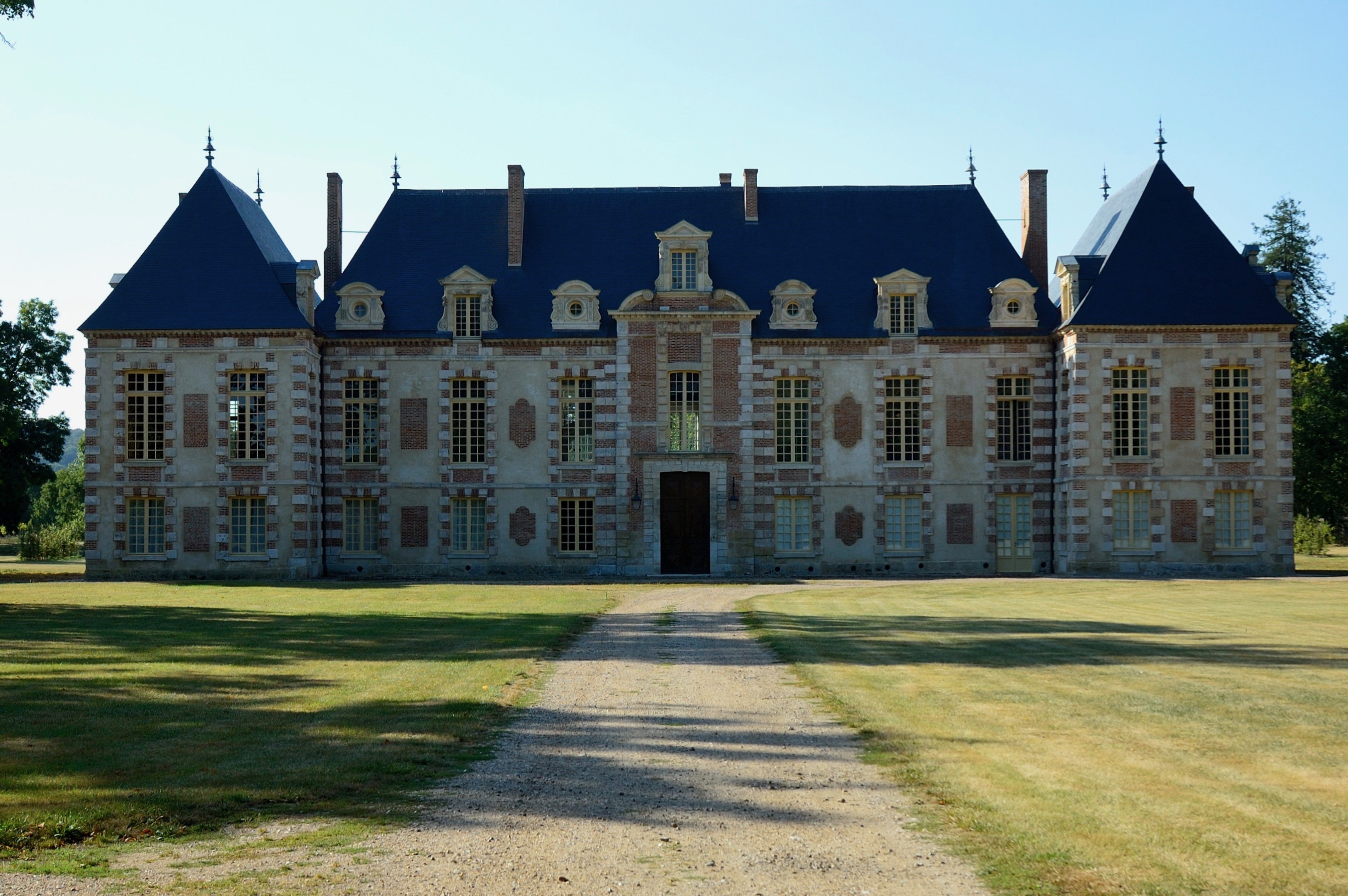 Abbaye de la Croix Saint-Leufroy.